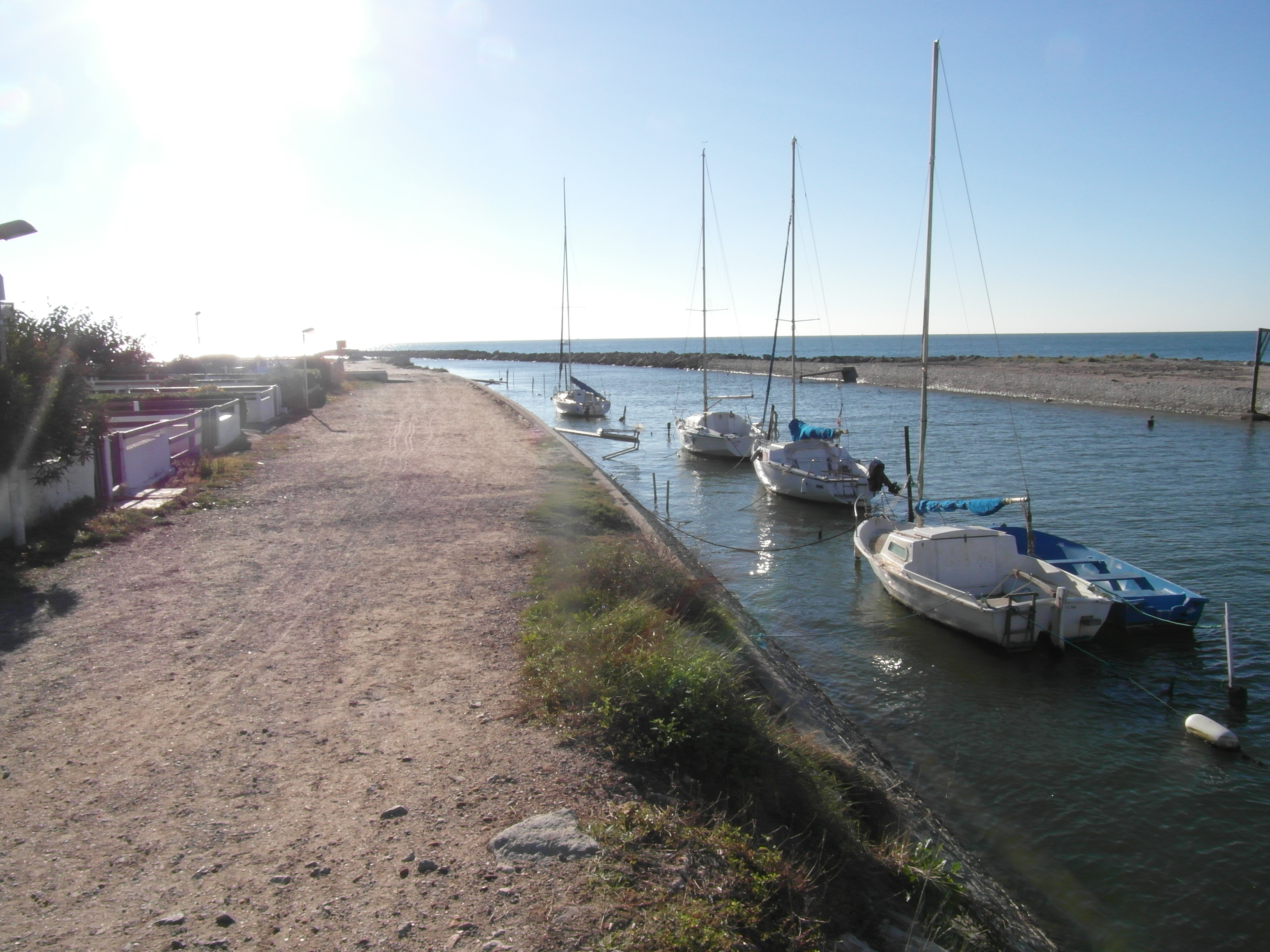 Grau du Prevost à Palavas en octobre 2016